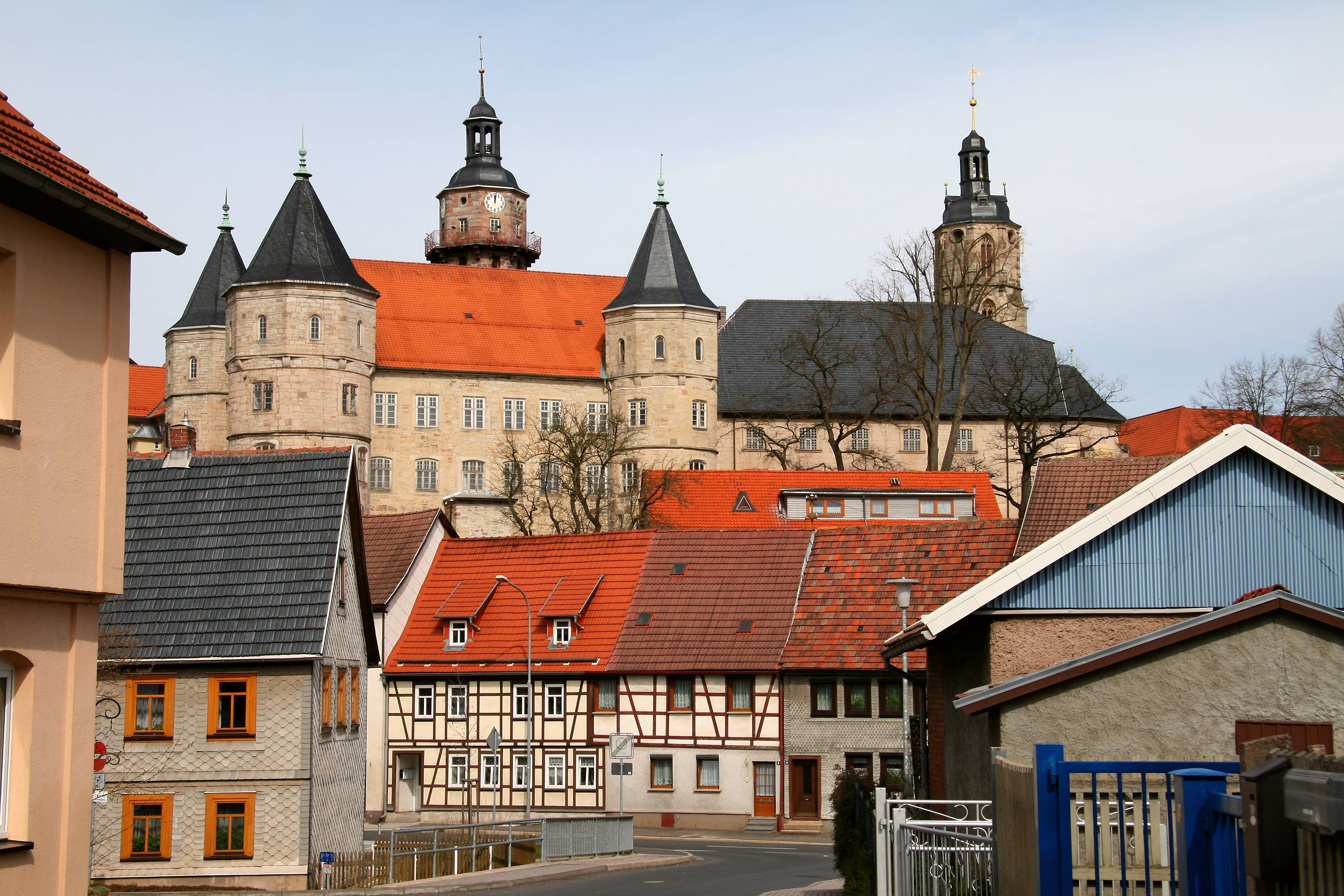 Schloss Bertholdsburg in Schleusingen von Süden. Rechts ist der Turm der Johanniskirche zu sehen.